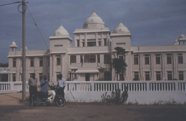 Jaffna Public Library